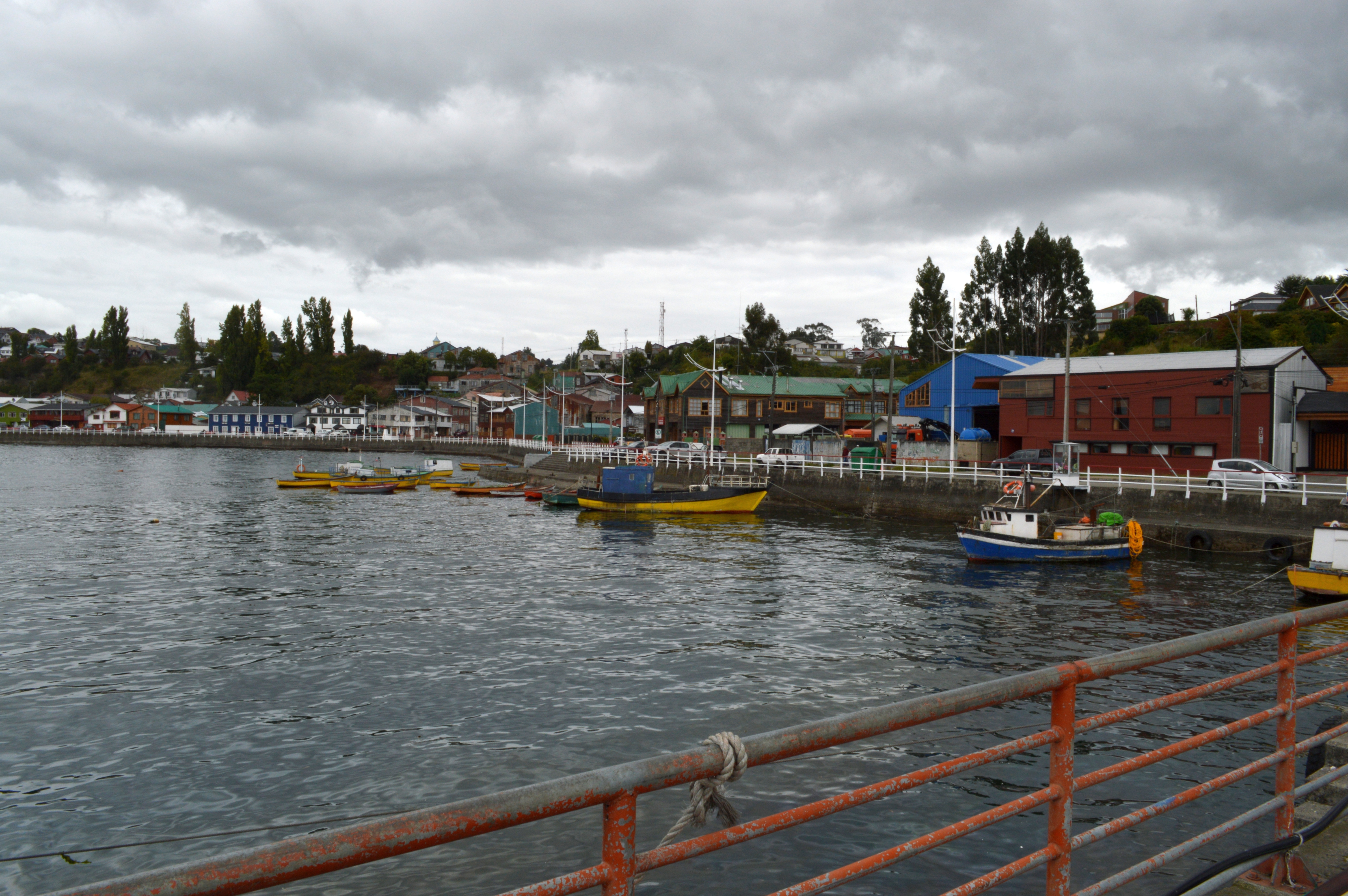 Costanera de Chonchi desde el Muelle.